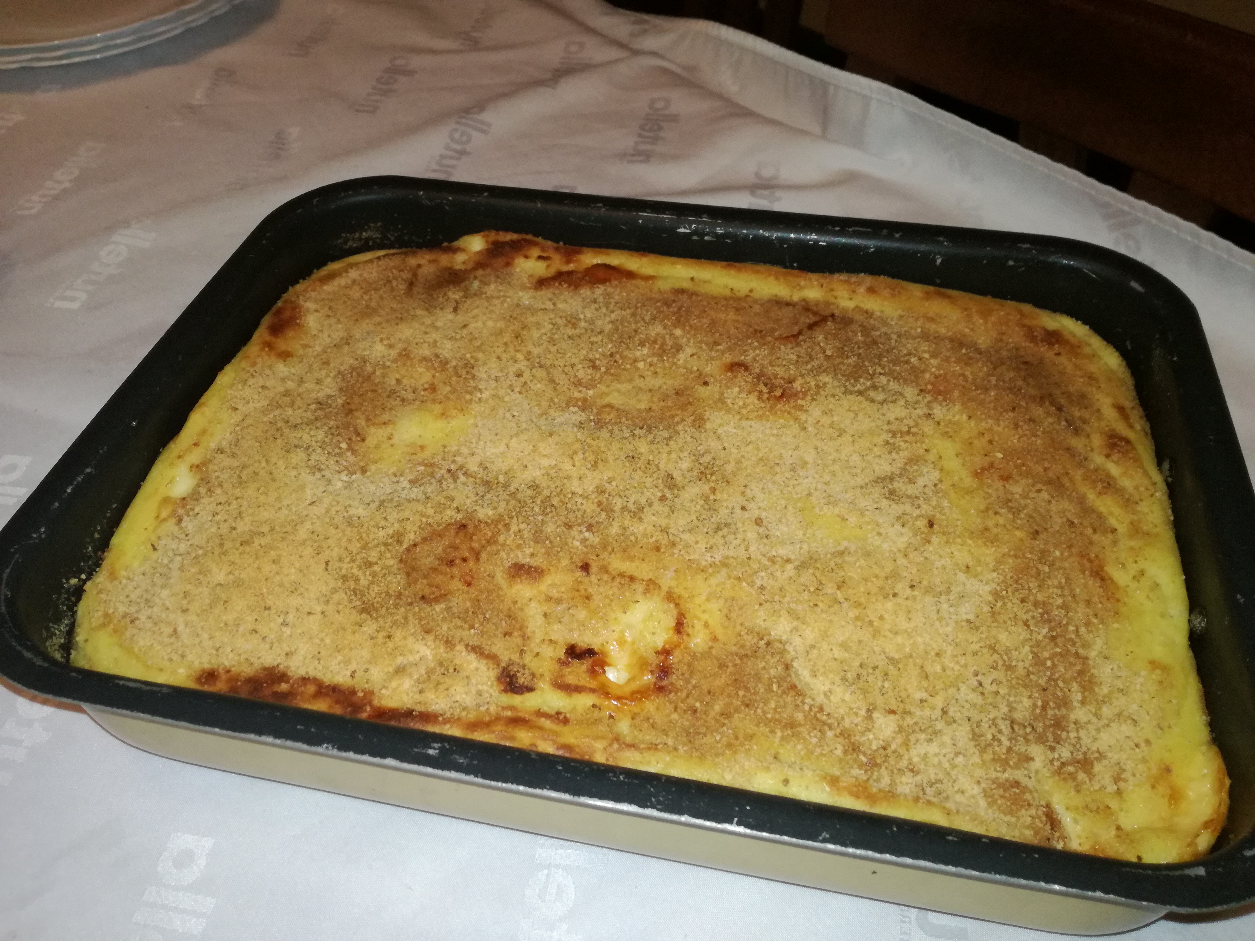 Gattò di patate